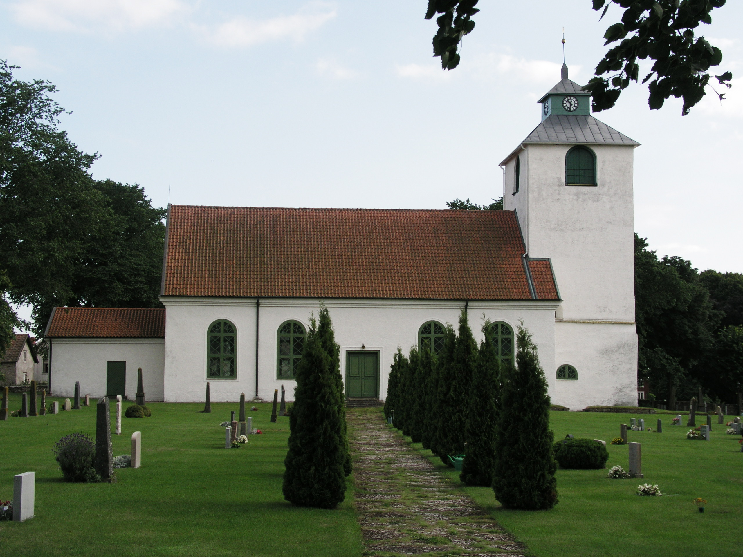 Hulterstad kyrka/church